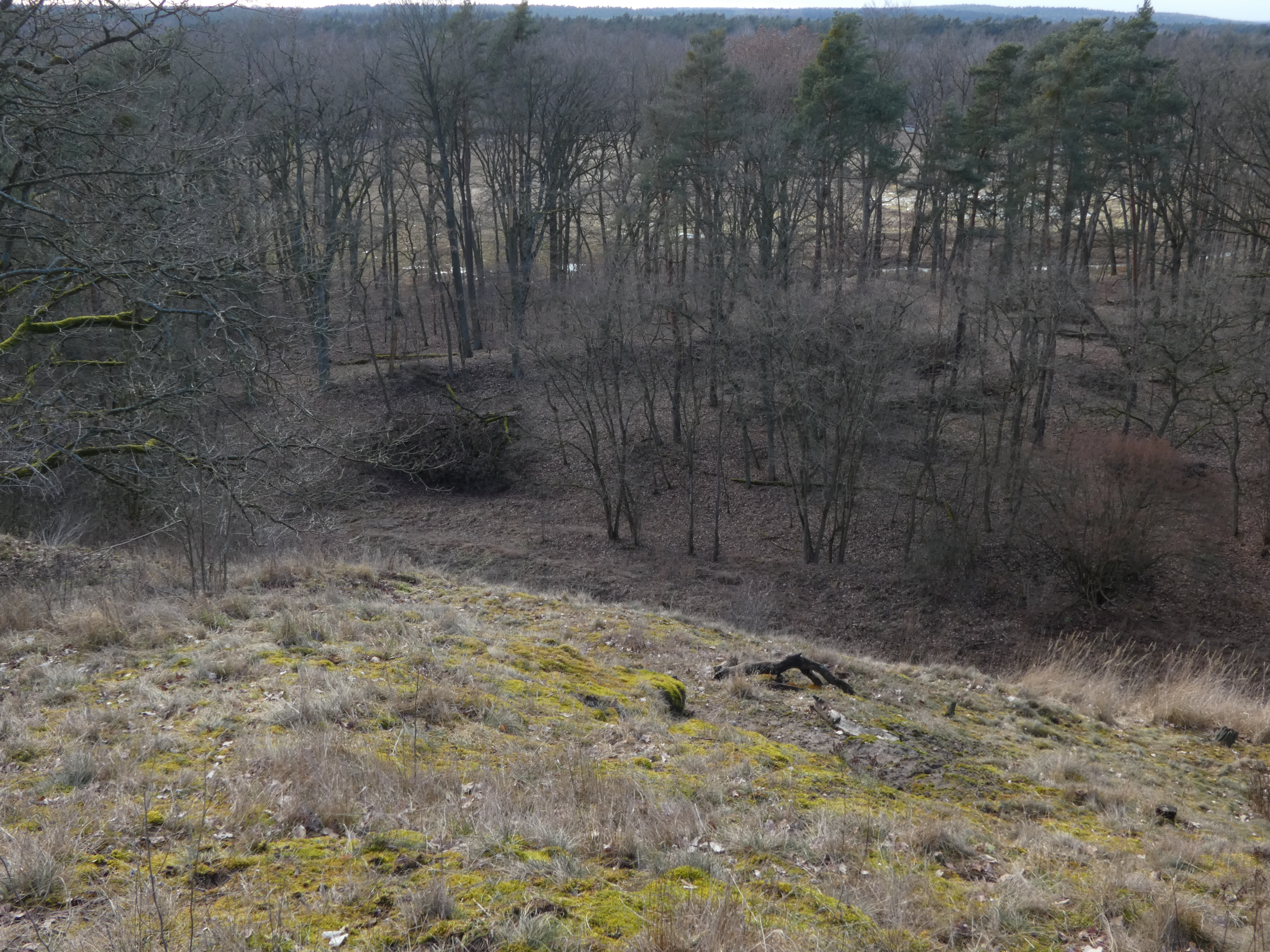 Burg Landin, Vorwälle